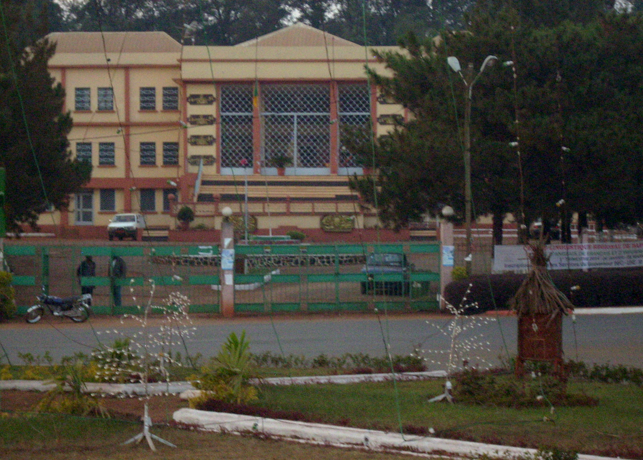 Bafoussam - Hôtel de ville - Carrefour